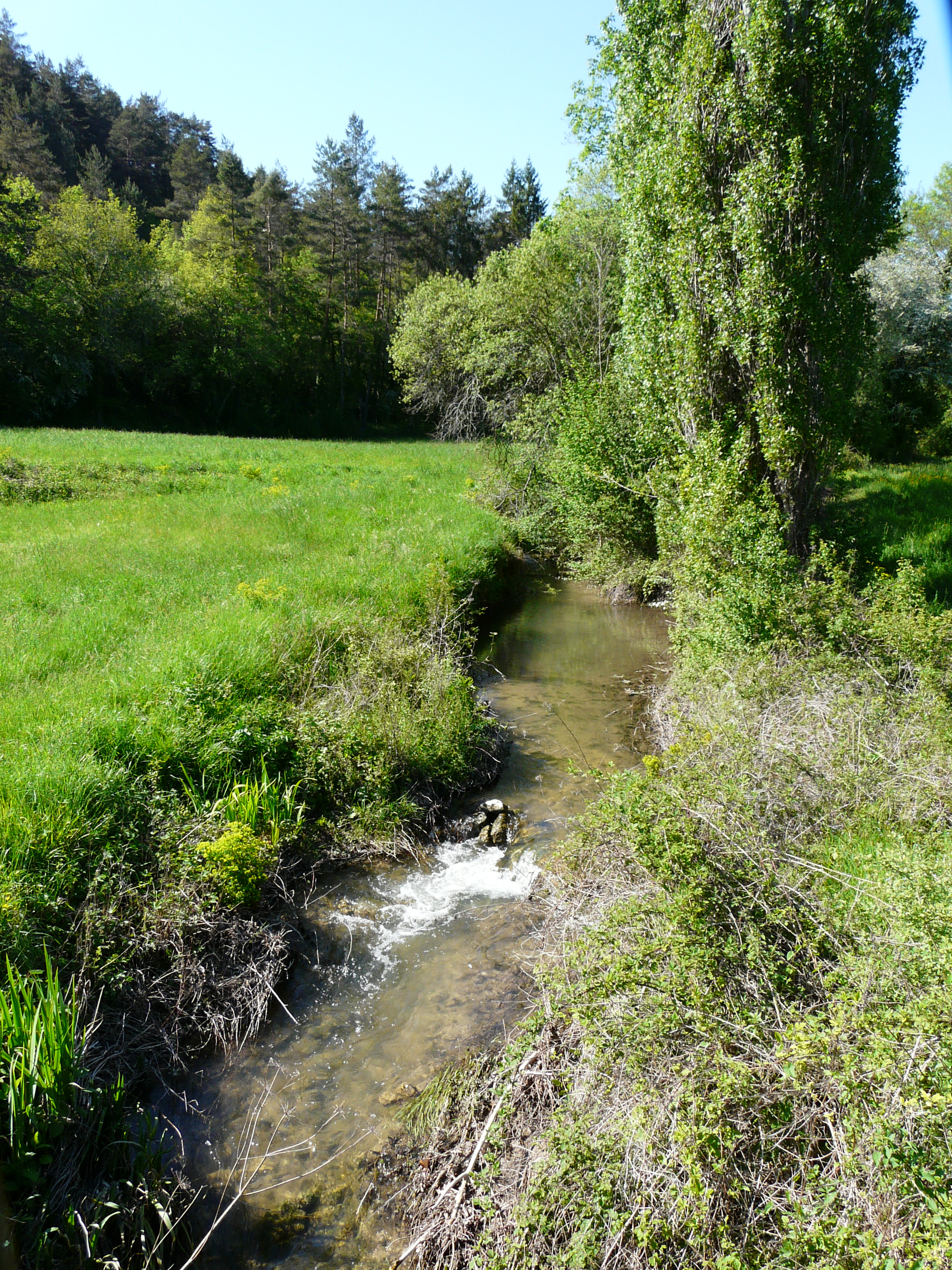 Le Thonac en amont du pont de Fanlac, Fanlac, Dordogne, France.